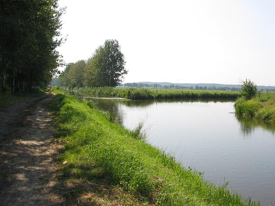 Zusammenfluss Nuthe-Nieplitz bei Gröben, Brandenburg - Im Hintergrund Glauer Berge